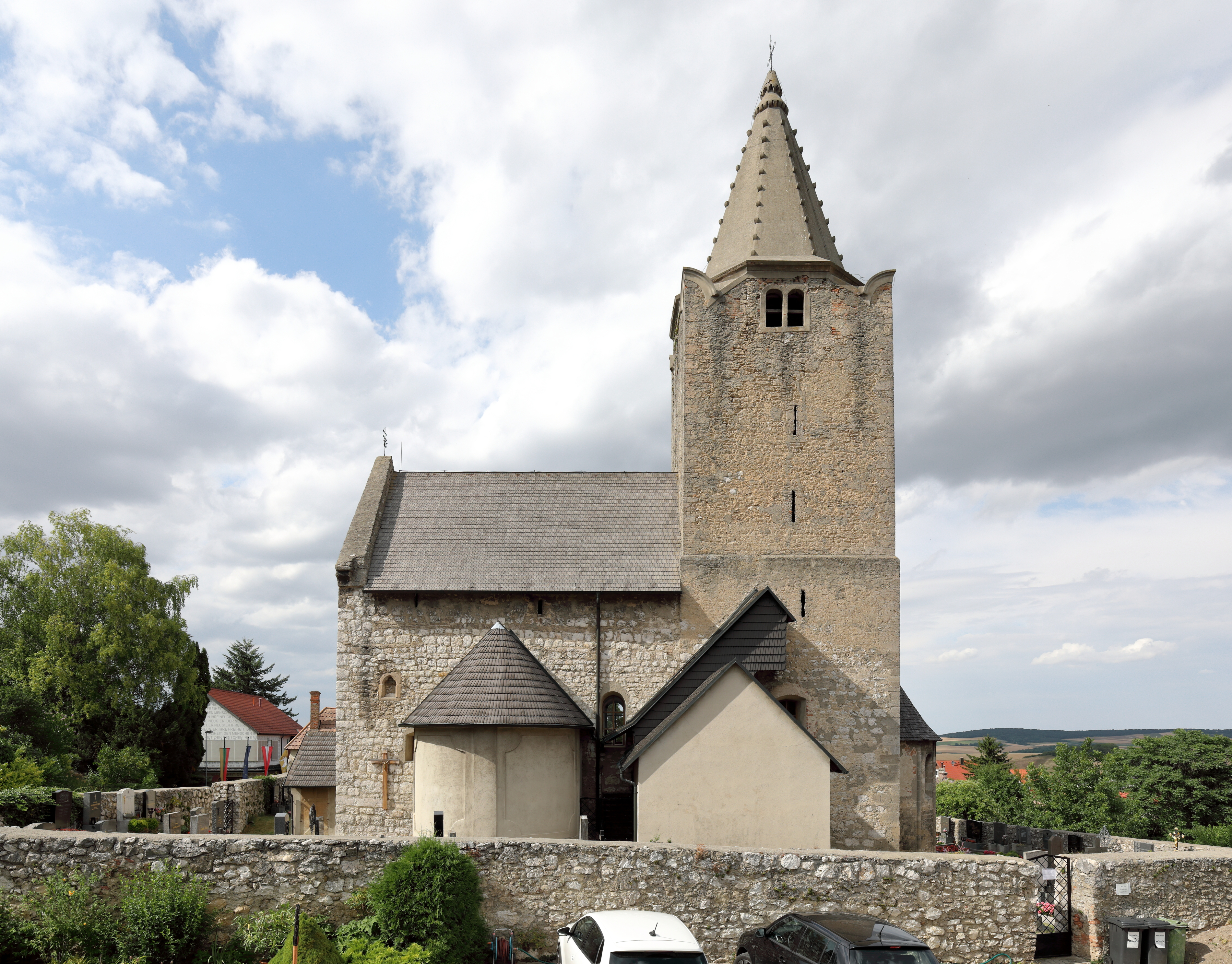 Südansicht der röm.-kath. Pfarrkirche hl. Veit in Michelstetten, ein Ortsteil der niederösterreichischen Marktgemeinde Asparn an der Zaya. Die spätromanische Wehrkirche mit frühgotischem Chorturm und eingezogener Rundapsis ist der älteste Kirchenbau im nordöstlichen Weinviertel. Sie ist von einem Friedhof umgeben, dessen Mauer teilweise frühmittelalterlich ist. Das Glockengeschoss des Turmes wurde im 16. Jahrhundert aufgesetzt und die eingeschossige Sakristei an der südlichen Chorturmwand wurde im Spätmittelalter errichtet. Die barocken und rund geschlossenen Kapellen mit Lisenengliederung an der Nord- und Südseite des Langhaus wurden 1752 angebaut.